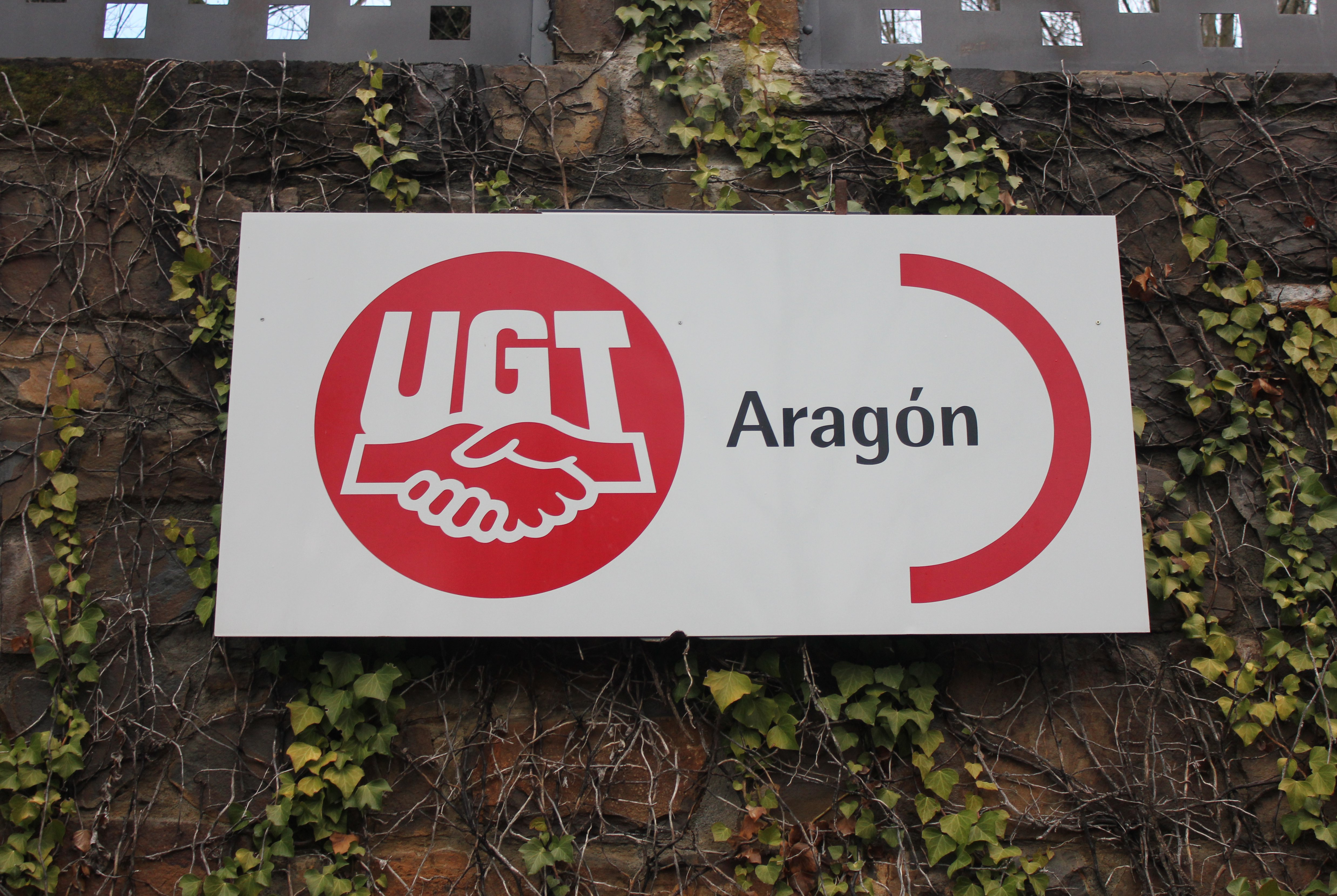 Aragonés: O Mesón de Ligüerre